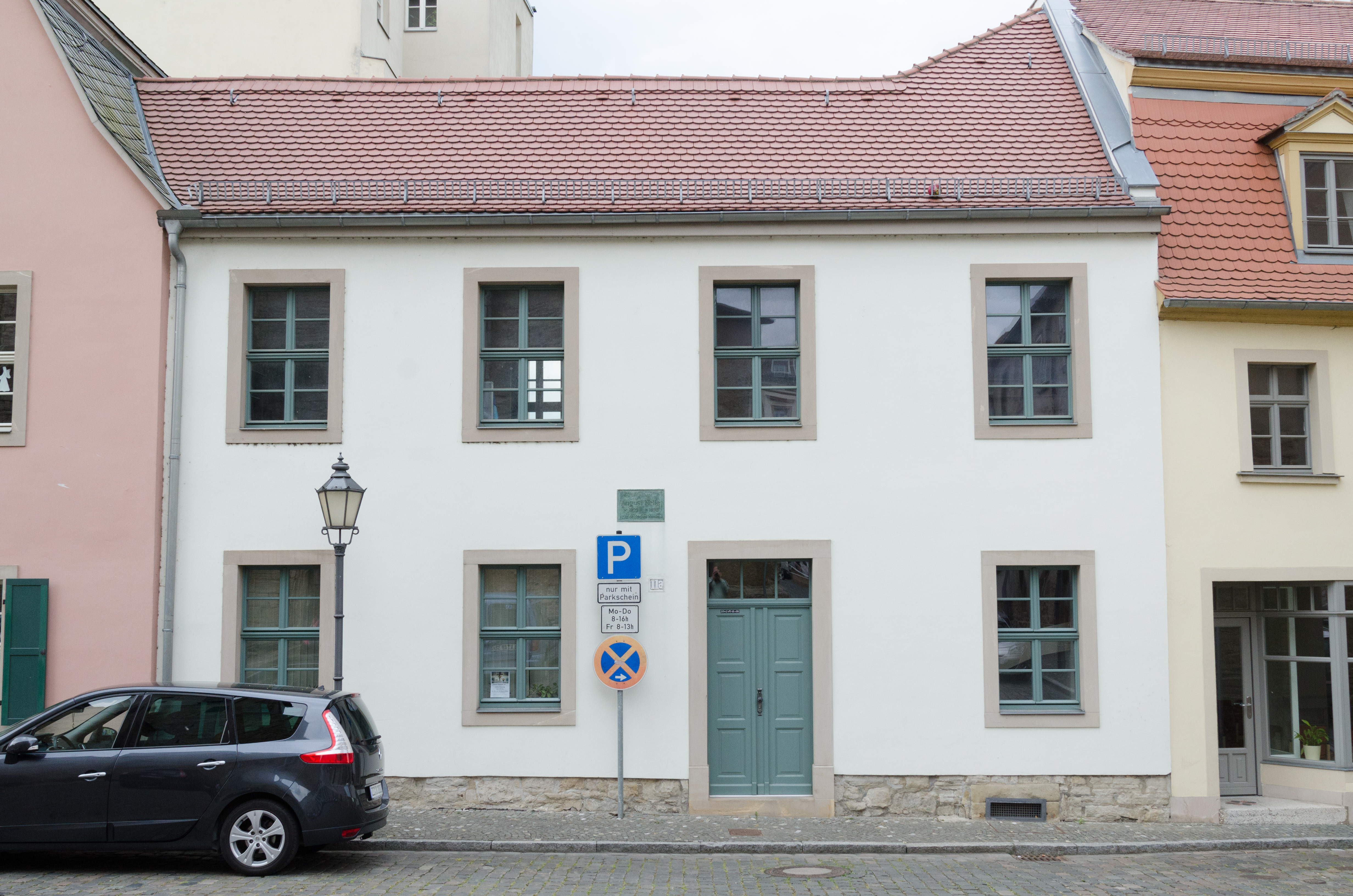 Zeitz, Michaeliskirchhof 11a